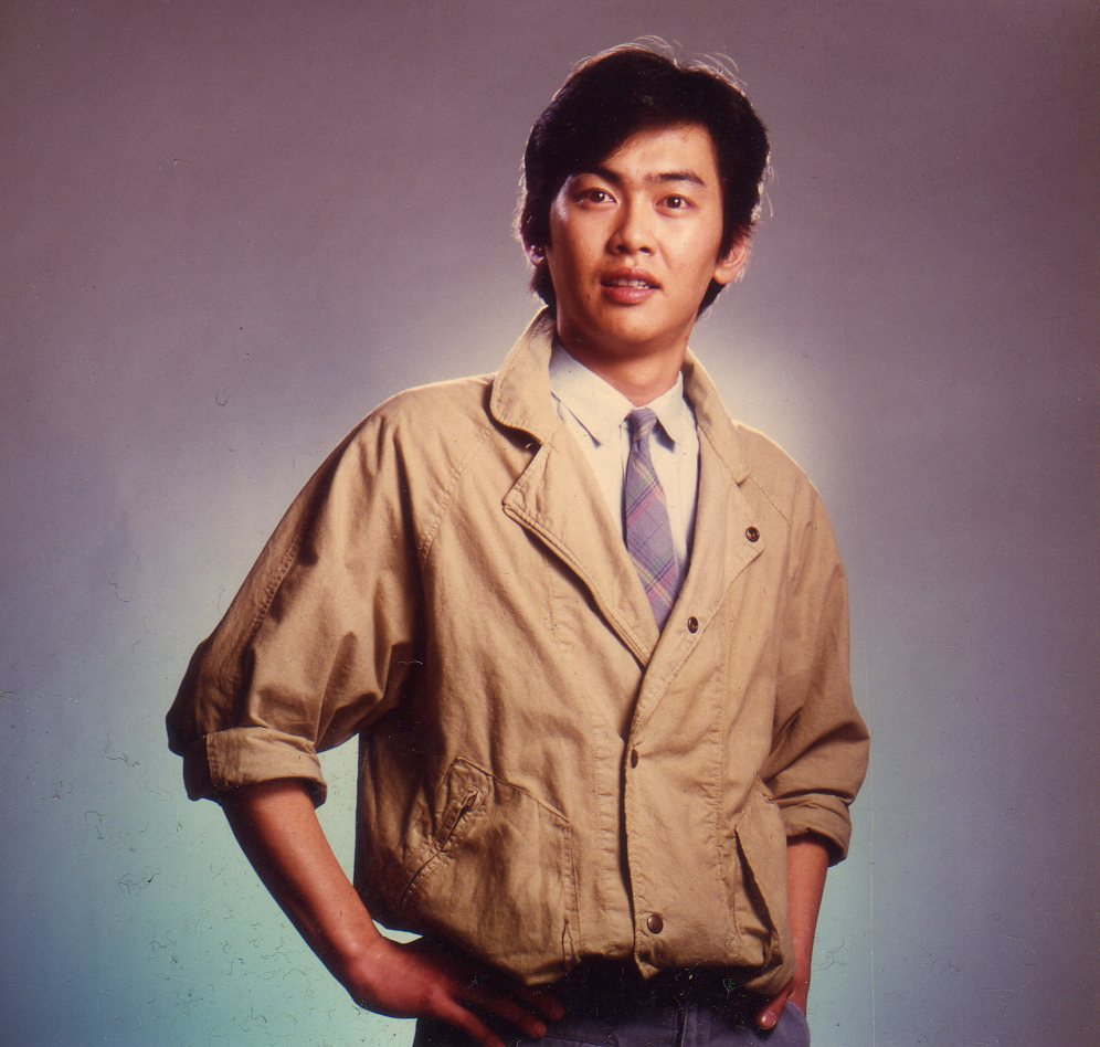 日本の元俳優